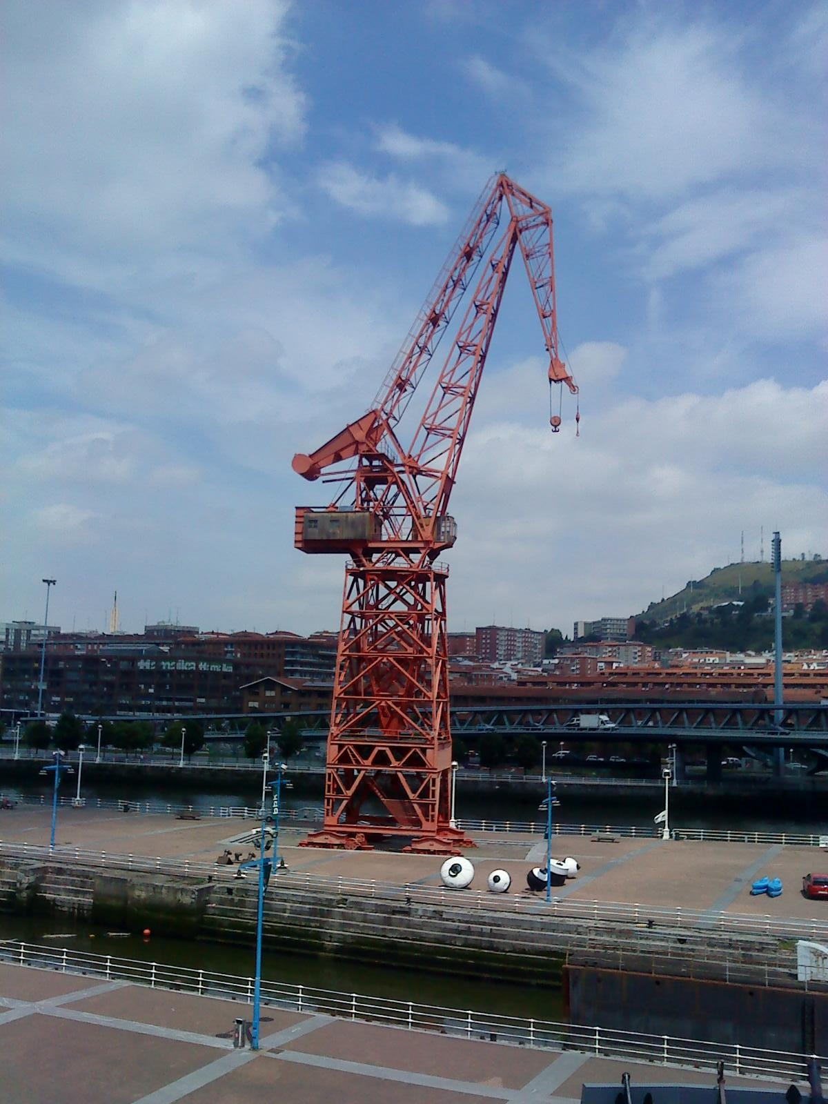 Grúa Carola en el Museo marítimo de Bilbao (País Vasco, España)